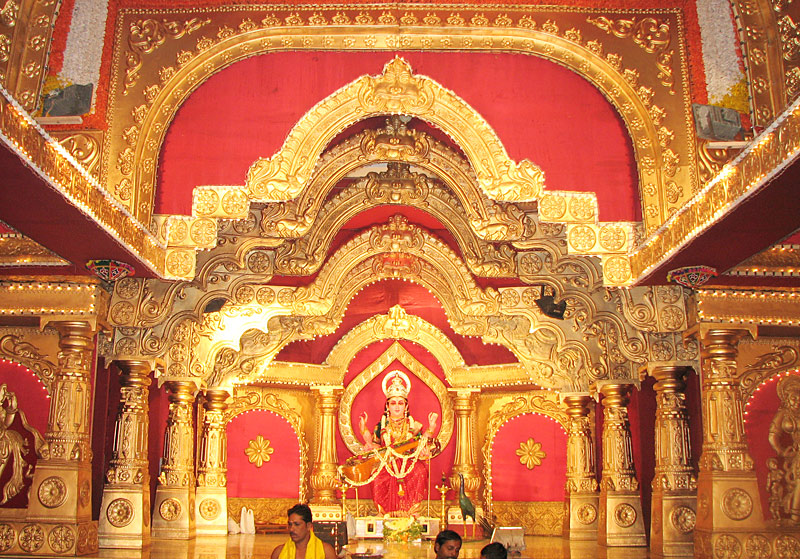 Sharada (sarasvati), Navaratri, Mangalore Kudroli temple